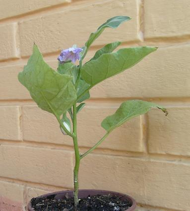 Solanum ovigerum Dun., Easter eggplant